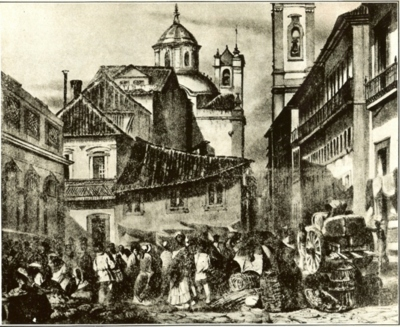 Rua do Ouvidor, Rio de Janeiro - Imagem do álbum de gravuras O Rio de Janeiro Pitoresco